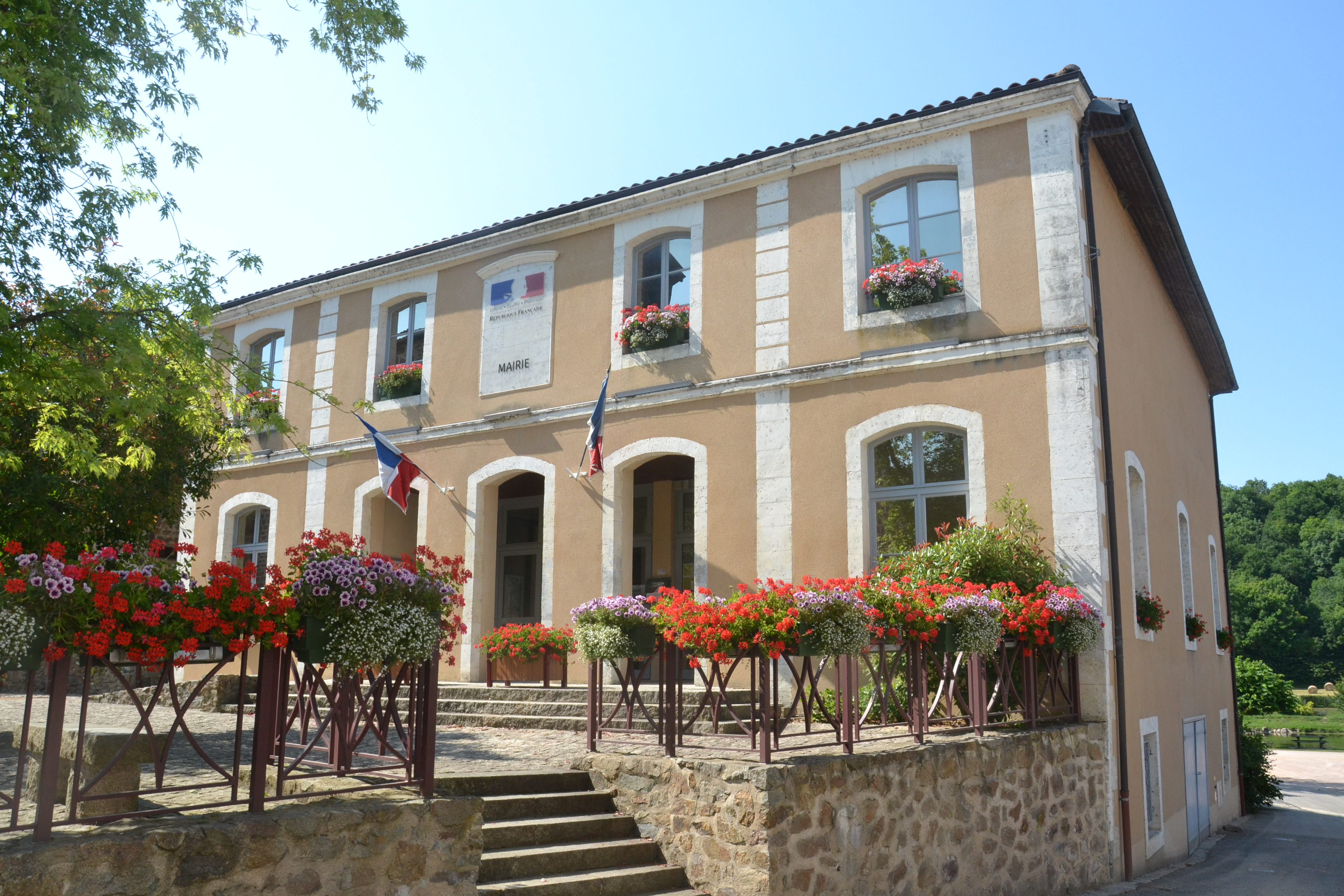 Mairie d'Exideuil-sur-Vienne (Charente, France)